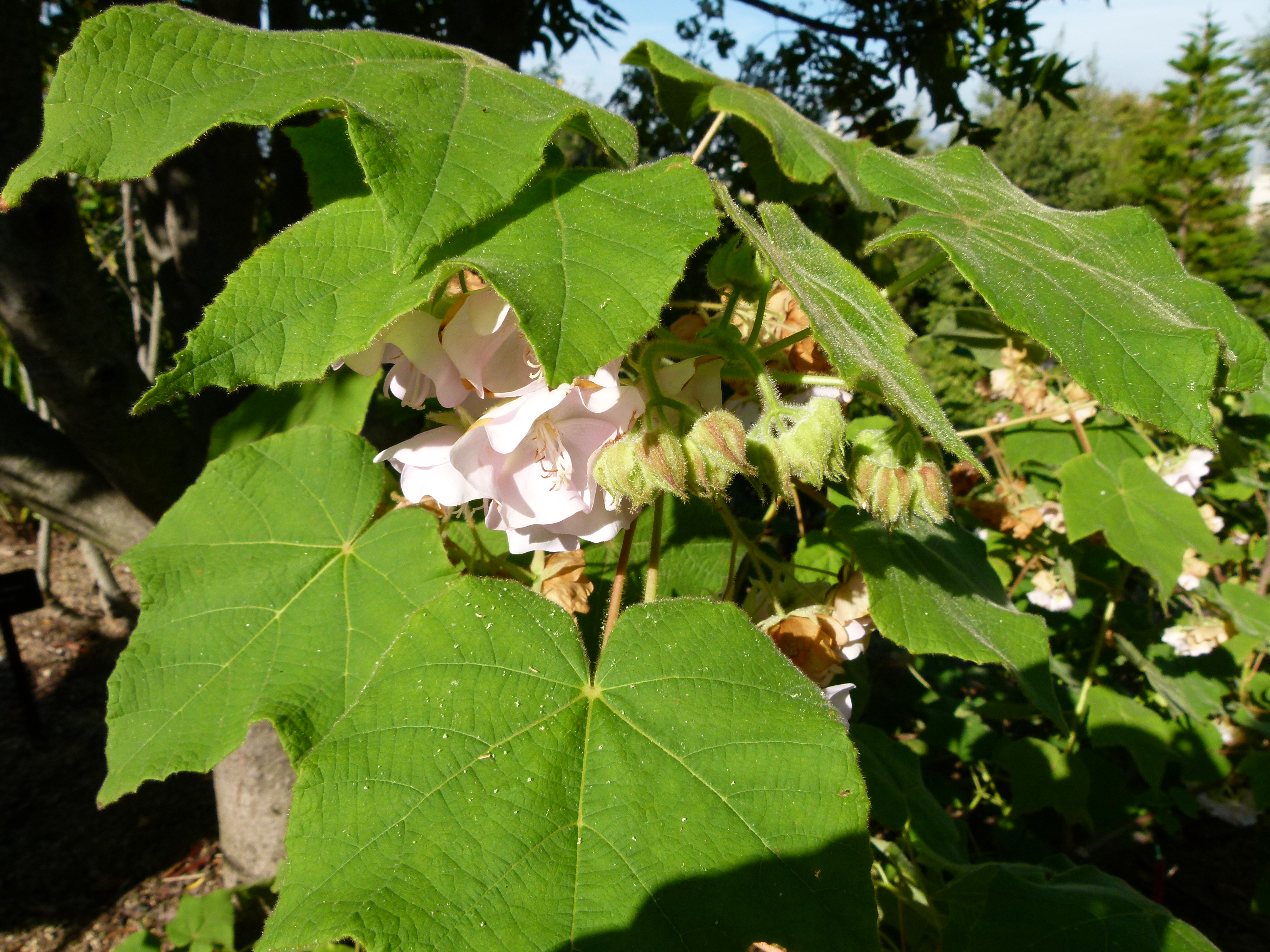 Dombeya burgessiae, Jardin botanique Montjuic, Barcelone